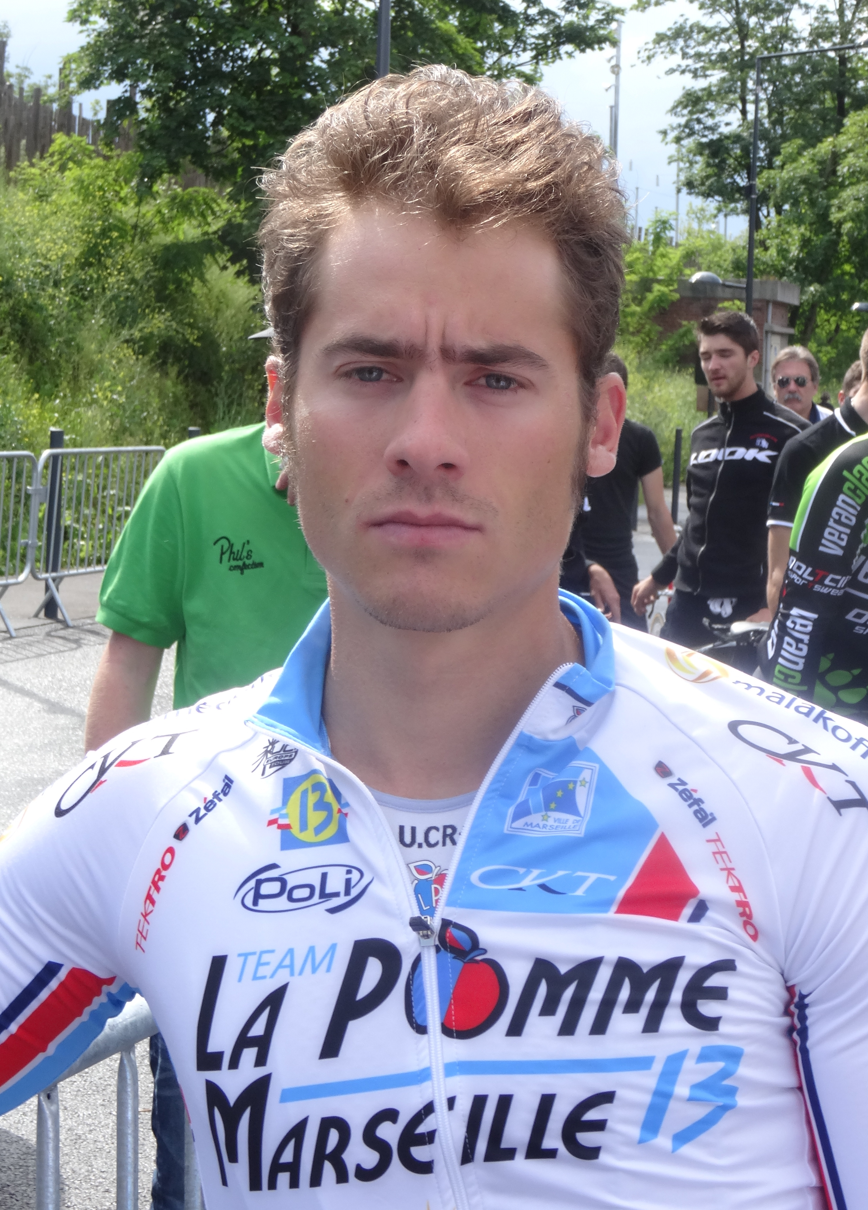 Reportage photographique réalisé le vendredi 23 mai 2014 à l'occasion du départ de la première étape du Paris-Arras Tour 2014 à Lens, Pas-de-Calais, Nord-Pas-de-Calais, France. Depicted person: Justin Jules